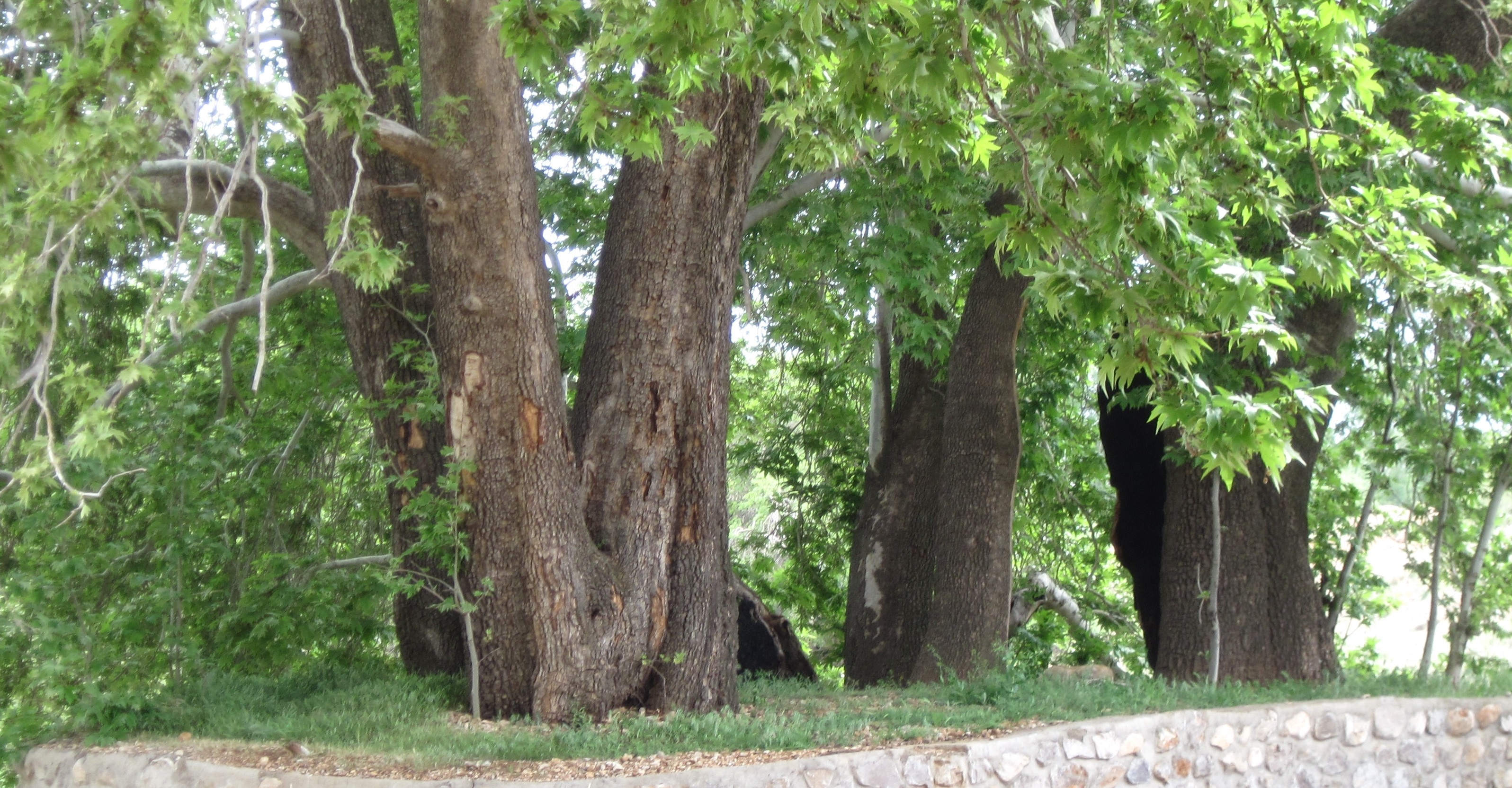 قدمگاه سده و یک مکان تفریحی بسیار معروف در منطقه سده